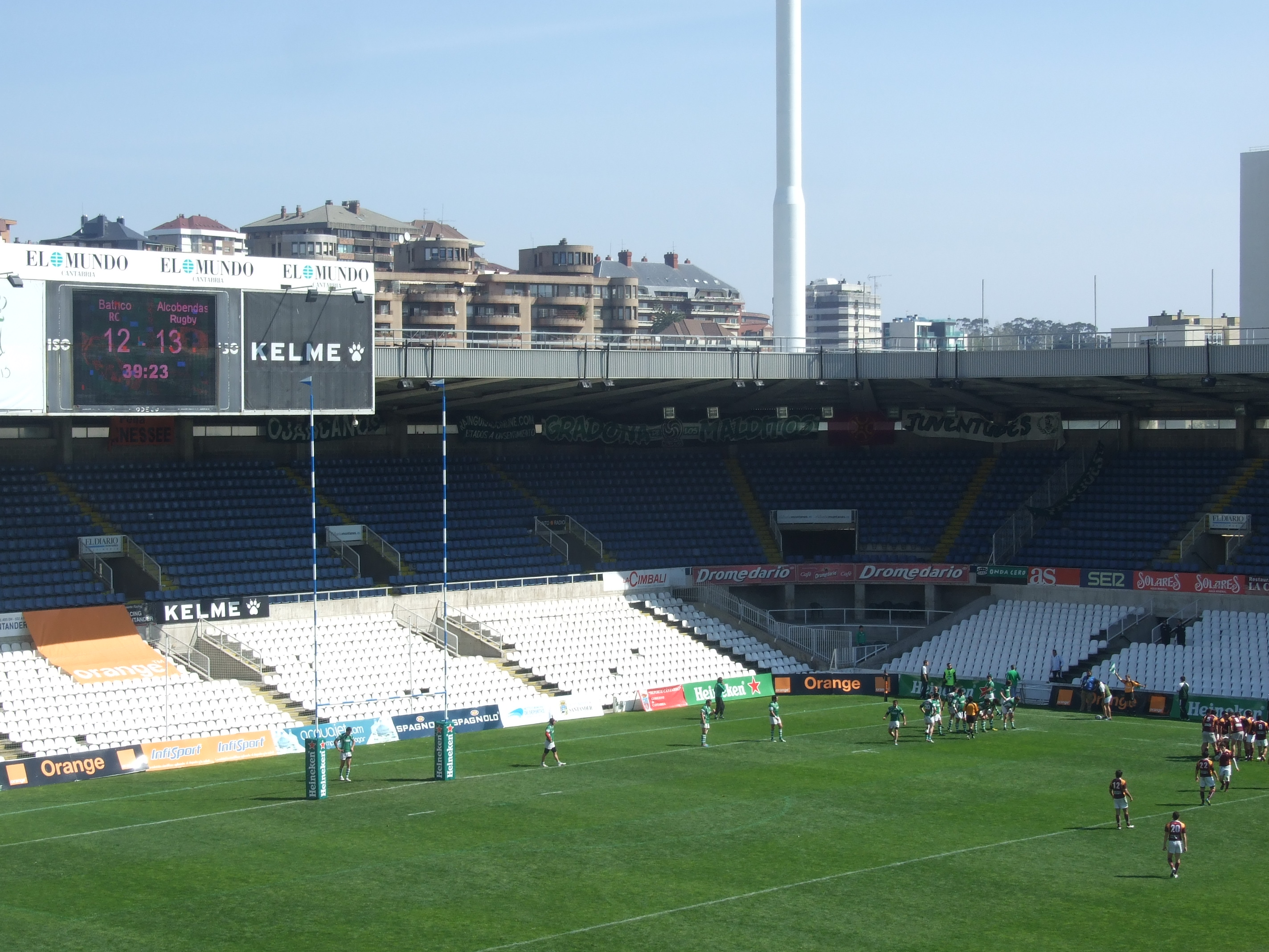 Ascenso a División de Honor del Independiente Bathco en el Sardinero, 5 de mayo de 2013